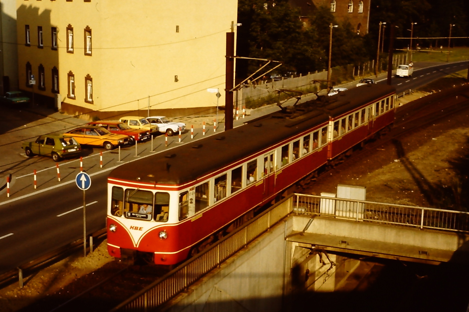 KBE ET 47als Linie 18 bei der Ausfahrt aus dem Rheinuferbahnhof Bonn